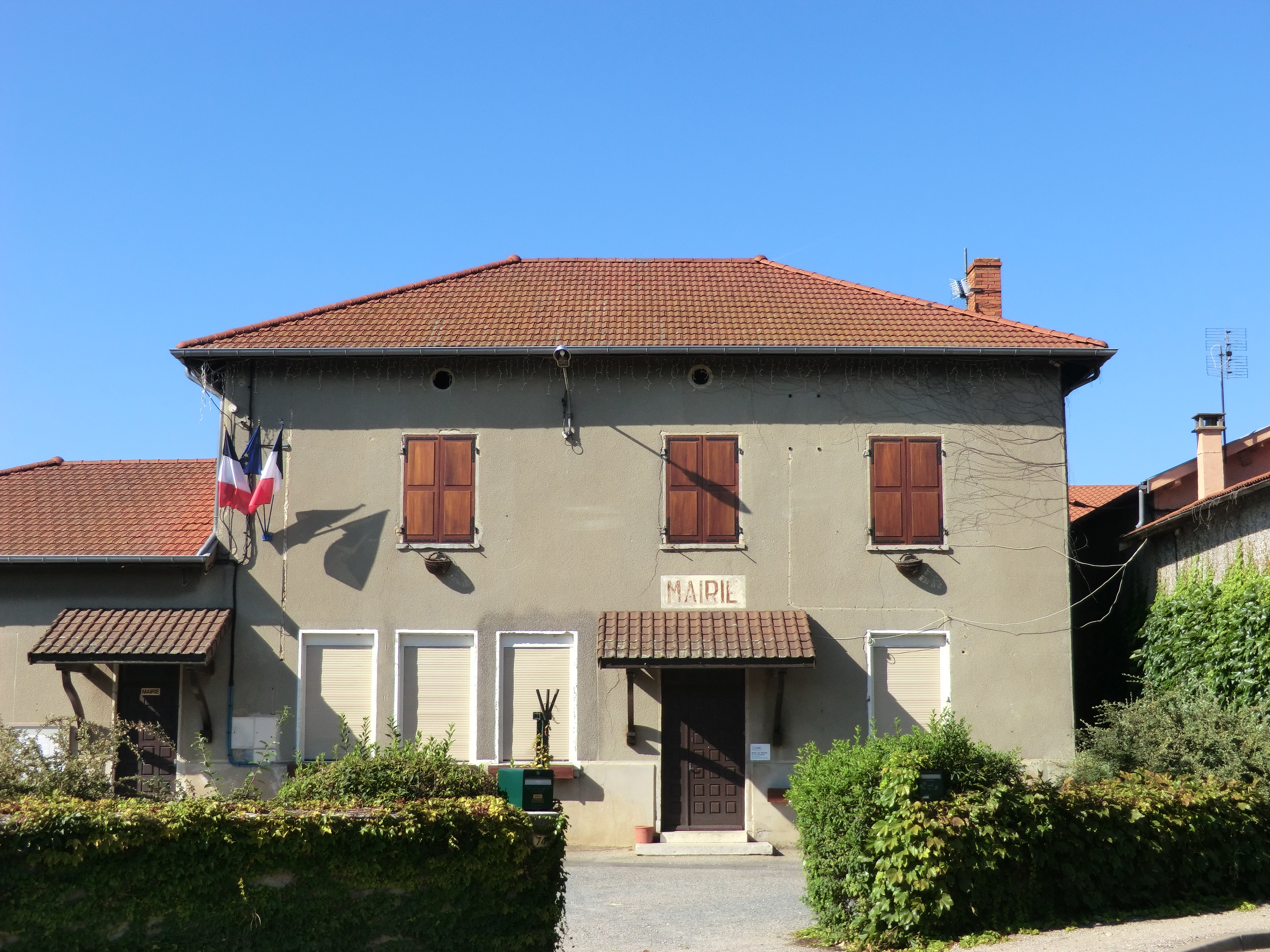 Mairie de Saint-Marcel (Ain).